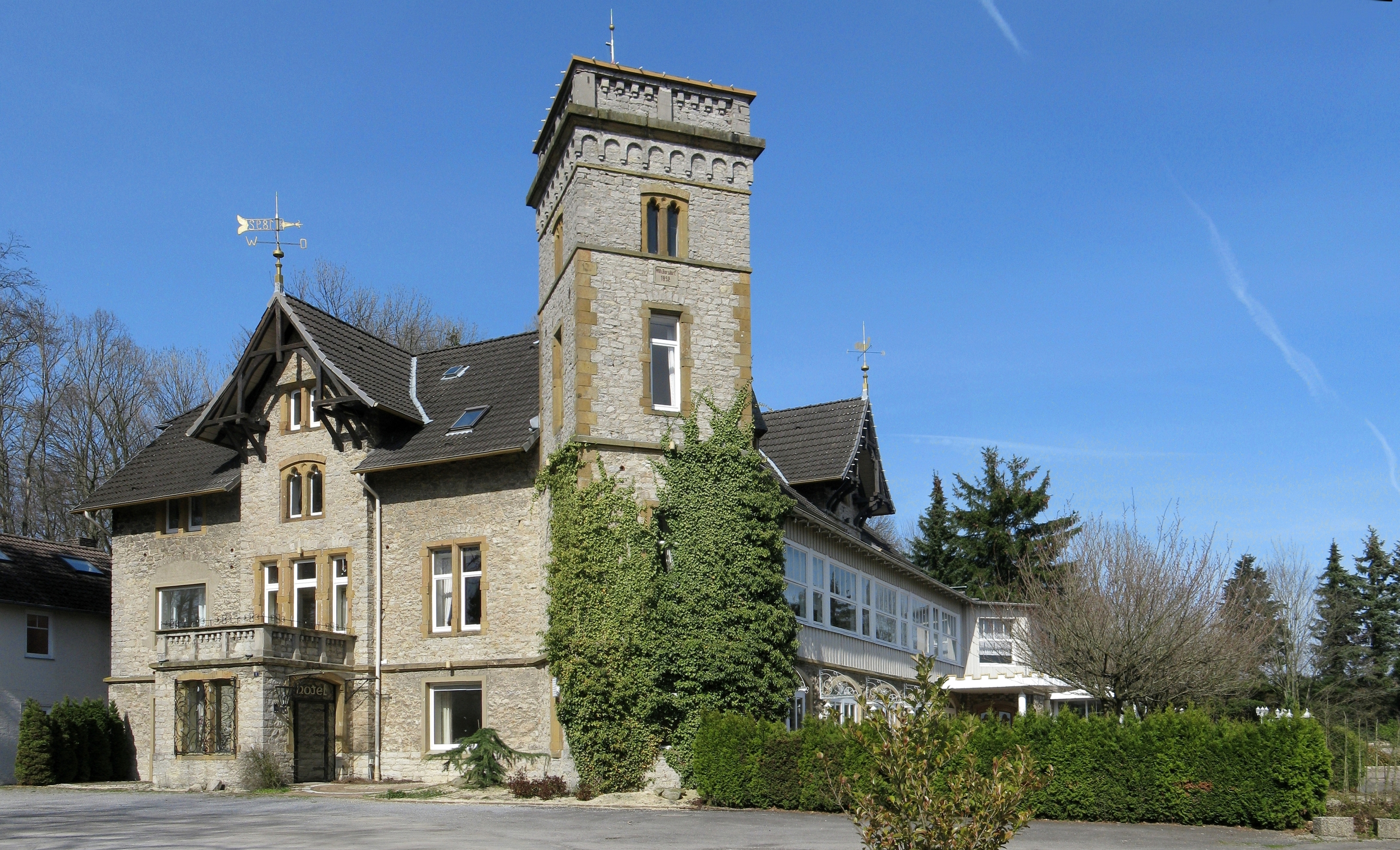 Die Wilhelmsburg in Lage/Lippe